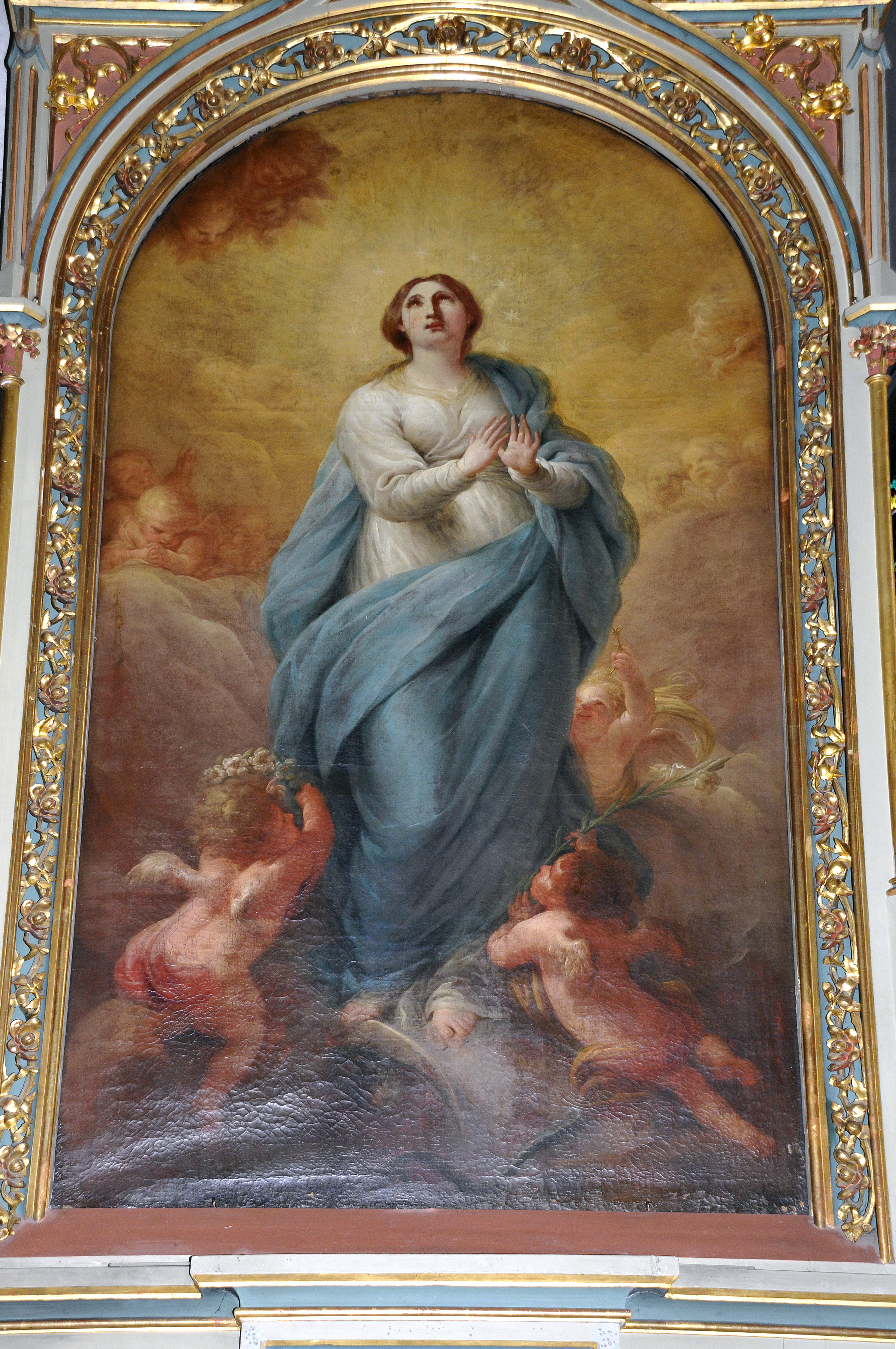 Josef Schöpf Altar in Klausen